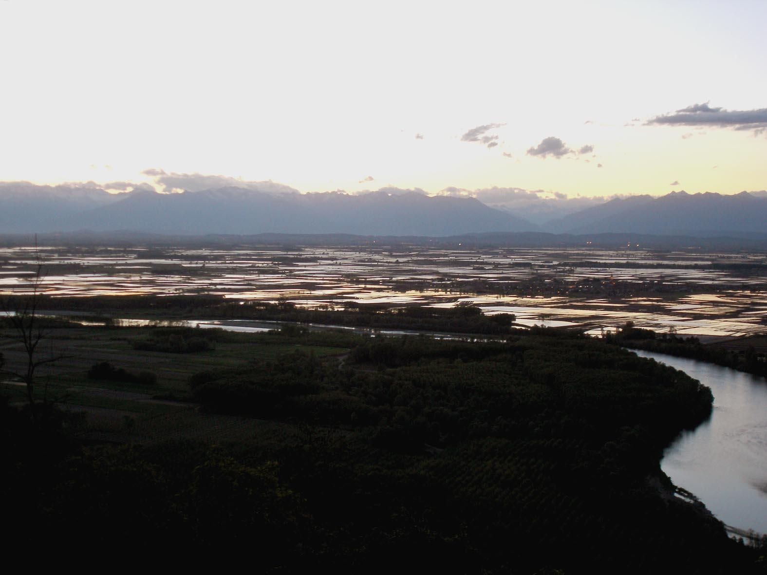 Risaie nella provincia di Vercelli